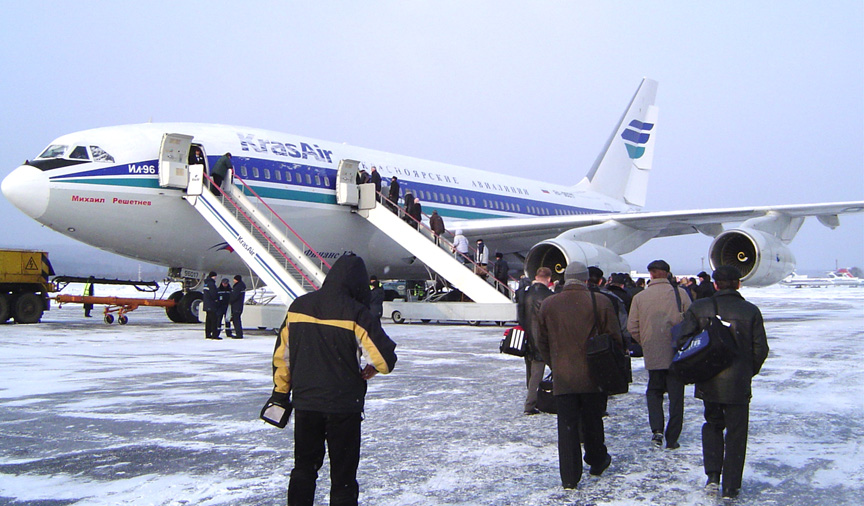 Самолет Ил 96 на Крас Еър